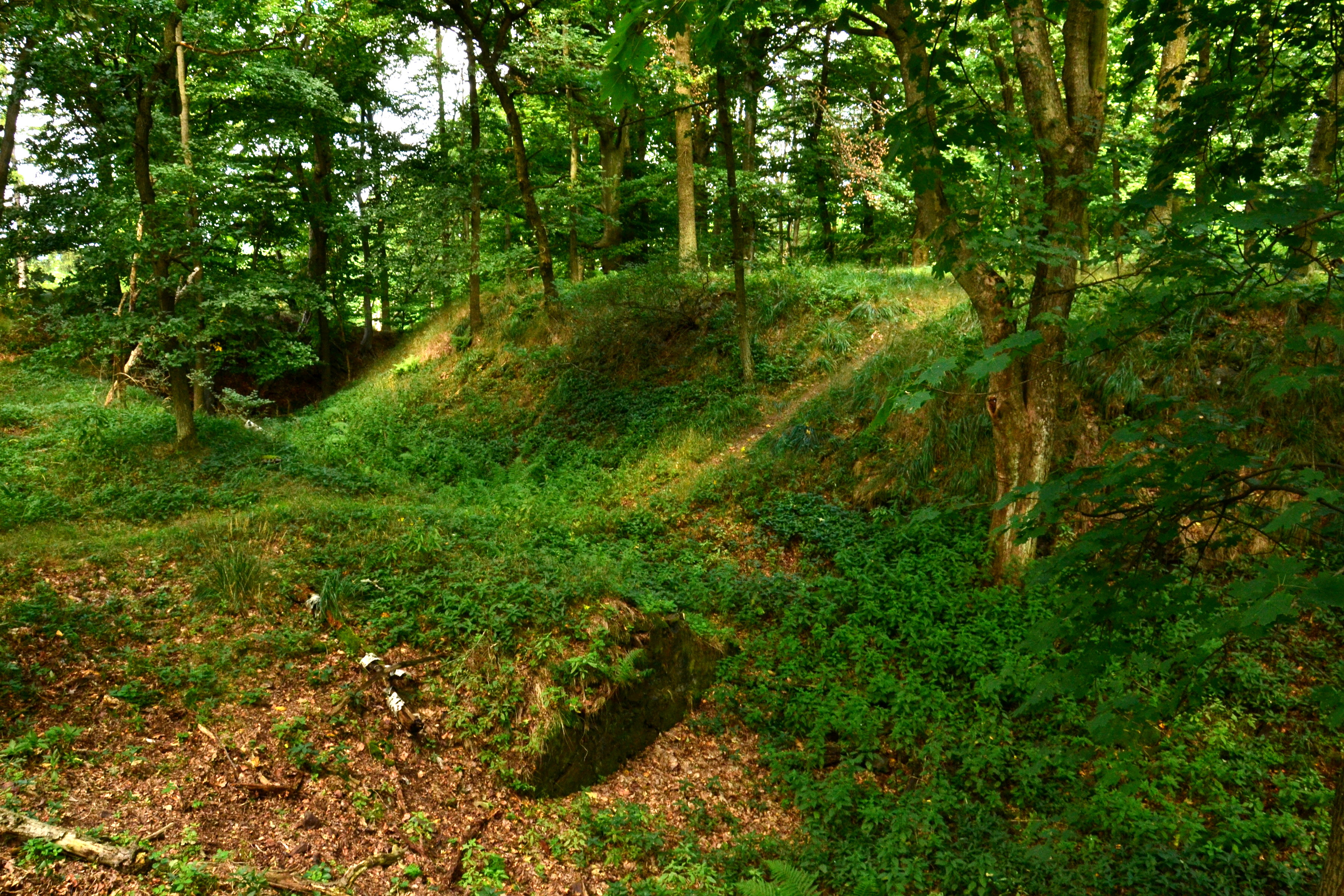 Příkop na jižní straně předhradí